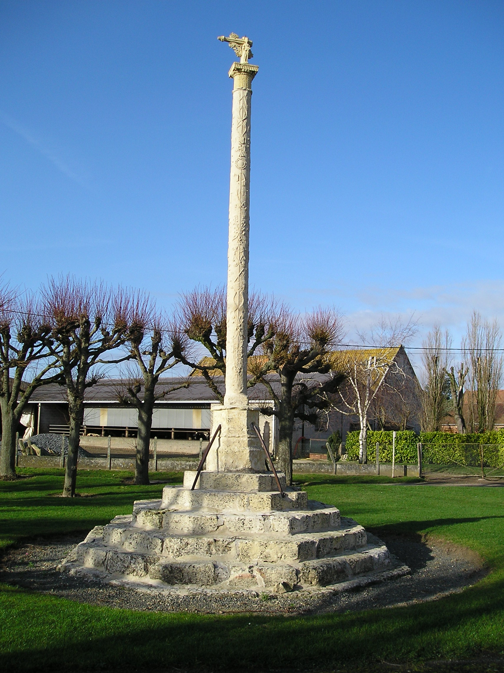 Il s'agit d'une croix en pierre armoirisée se trouvant sur la place du village. Elle possède une belle colonne sculptée datant du XVIème siècle. (Photographie prise le 14 janvier 2007) .